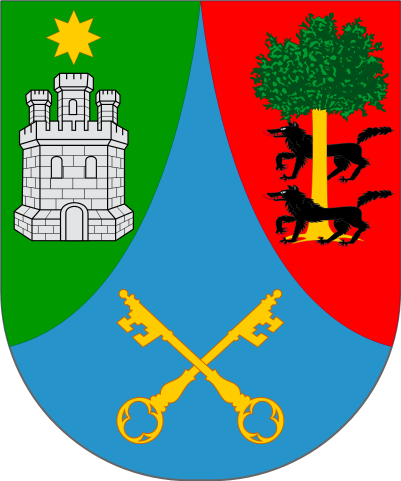 Atxondo haranaren armarri berria. Gortinatua; lehenean horlegian zortzi puntago urrezko izar bat eta zilarrezko gaztelu bat bere hargin-lan osoarekin; bigarrenean gorrian bere koloreko aritz bat bi otso paluan zeharkatuta; azkenik puntan urdin kolorean bi urrezko giltza gurutzatuak.